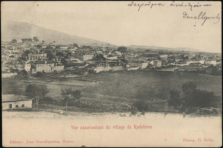 Радолиово в 1904 г.